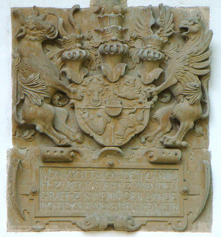 Wappenstein 1588 am Torhaus des Schlosses in Mirow